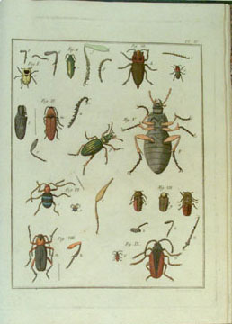 plate from Histoire abrégée des Insectes qui se trouvent aux environs de Paris; dans laquelle ces Animaux sont rangés suivant un ordre méthodique. Paris, Durand, 1762.